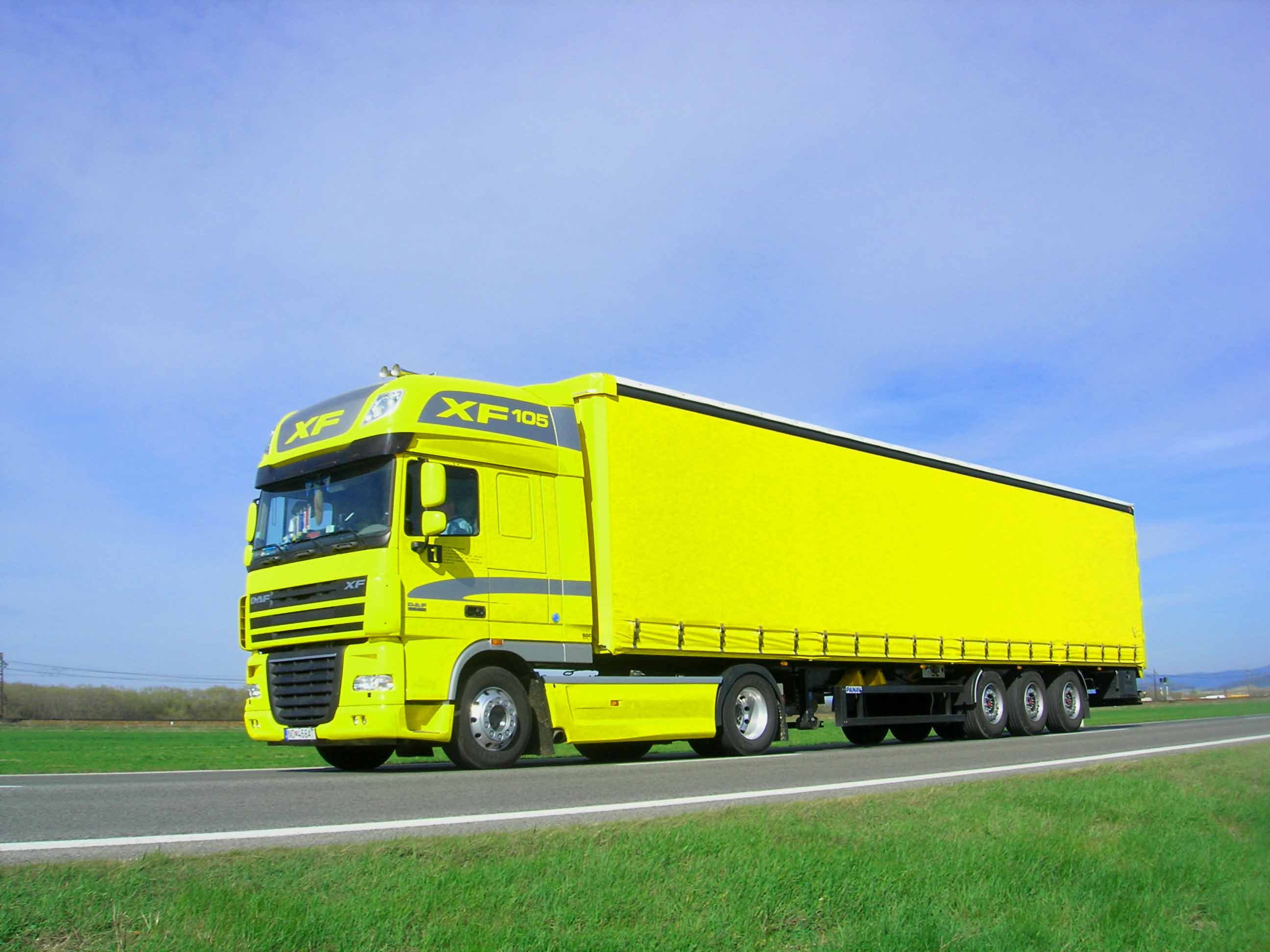 DAF XF105.460 SSC